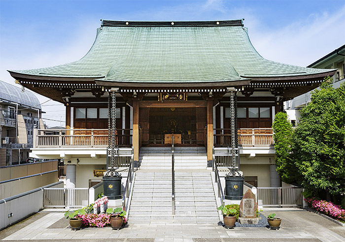 東漸寺本堂